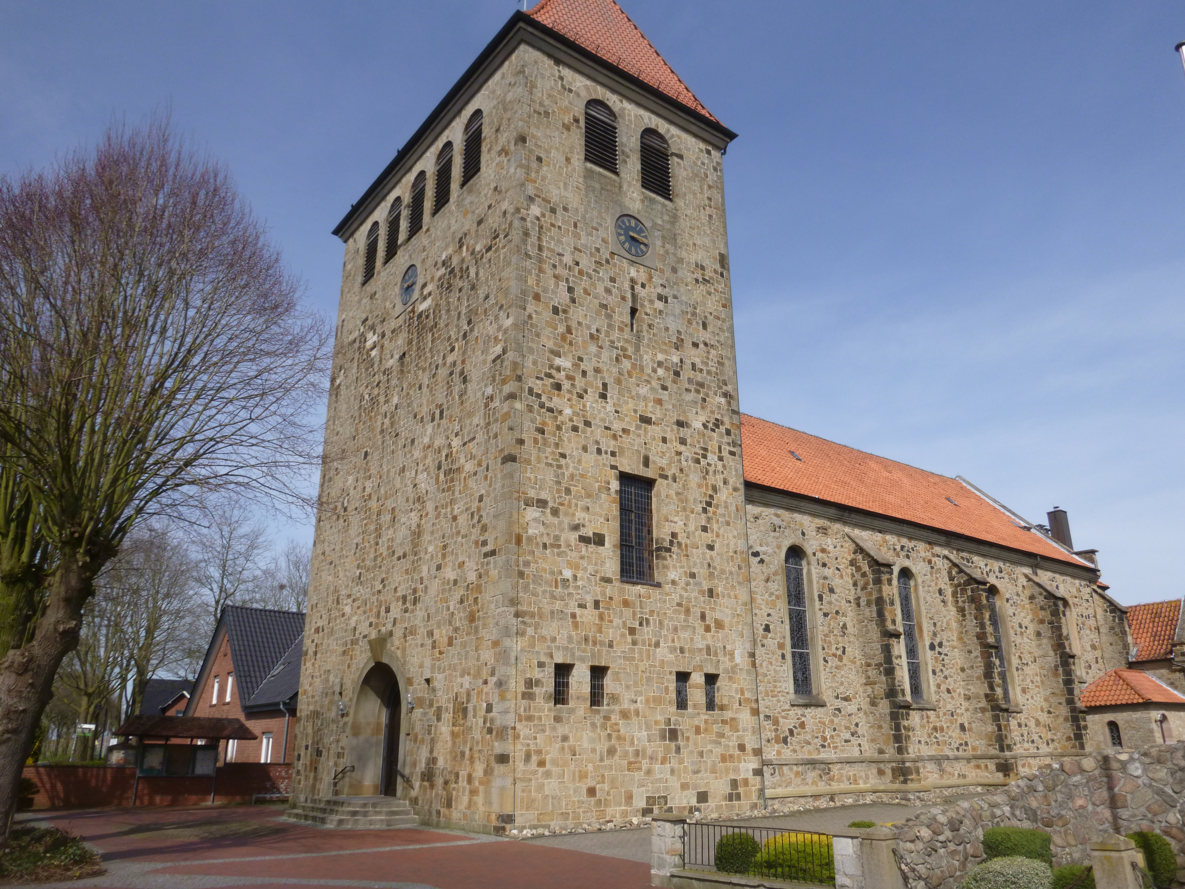 katolika kirko en Andervenne, Malsupra Saksio, Germanio